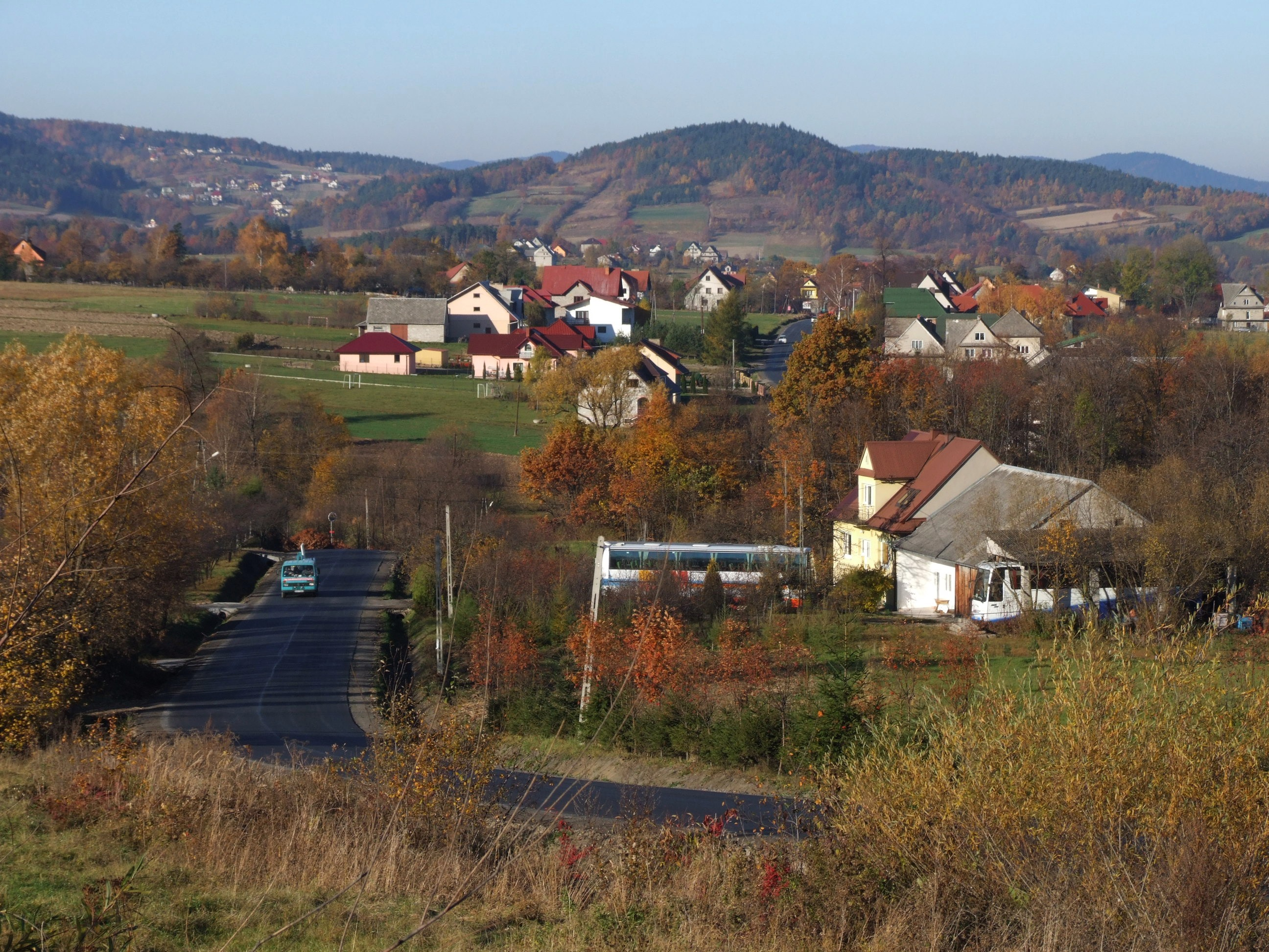 Zasań. Widok ogólny